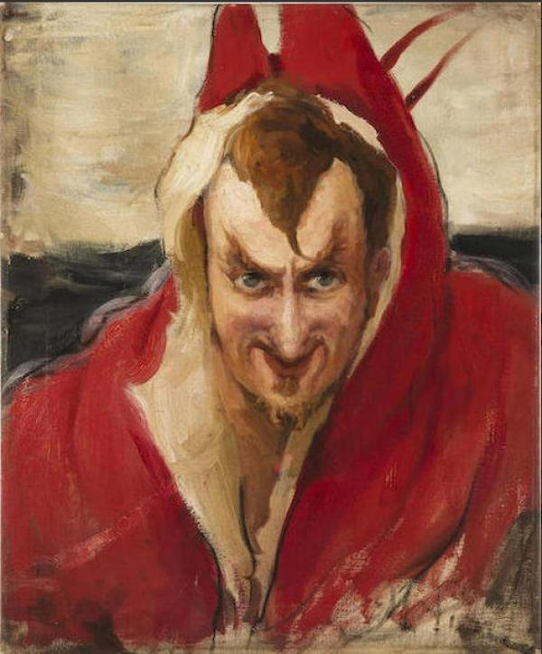 Илья РЕПИН Портрет Григория Ге в образе Мефистофеля Холст, масло. 61,1 × 51,4